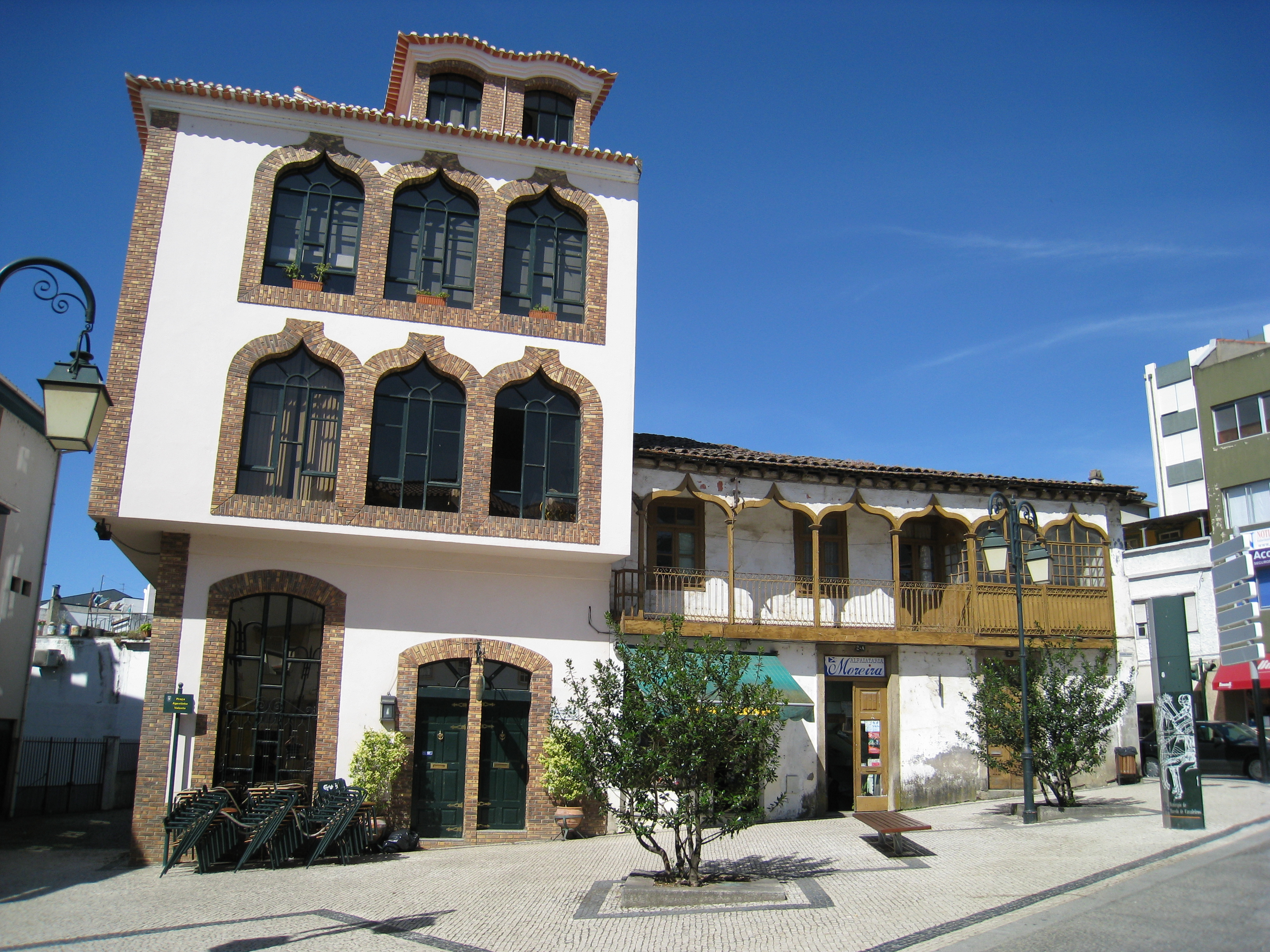 Plaza en Macedo de Cavaleiros, Portugal